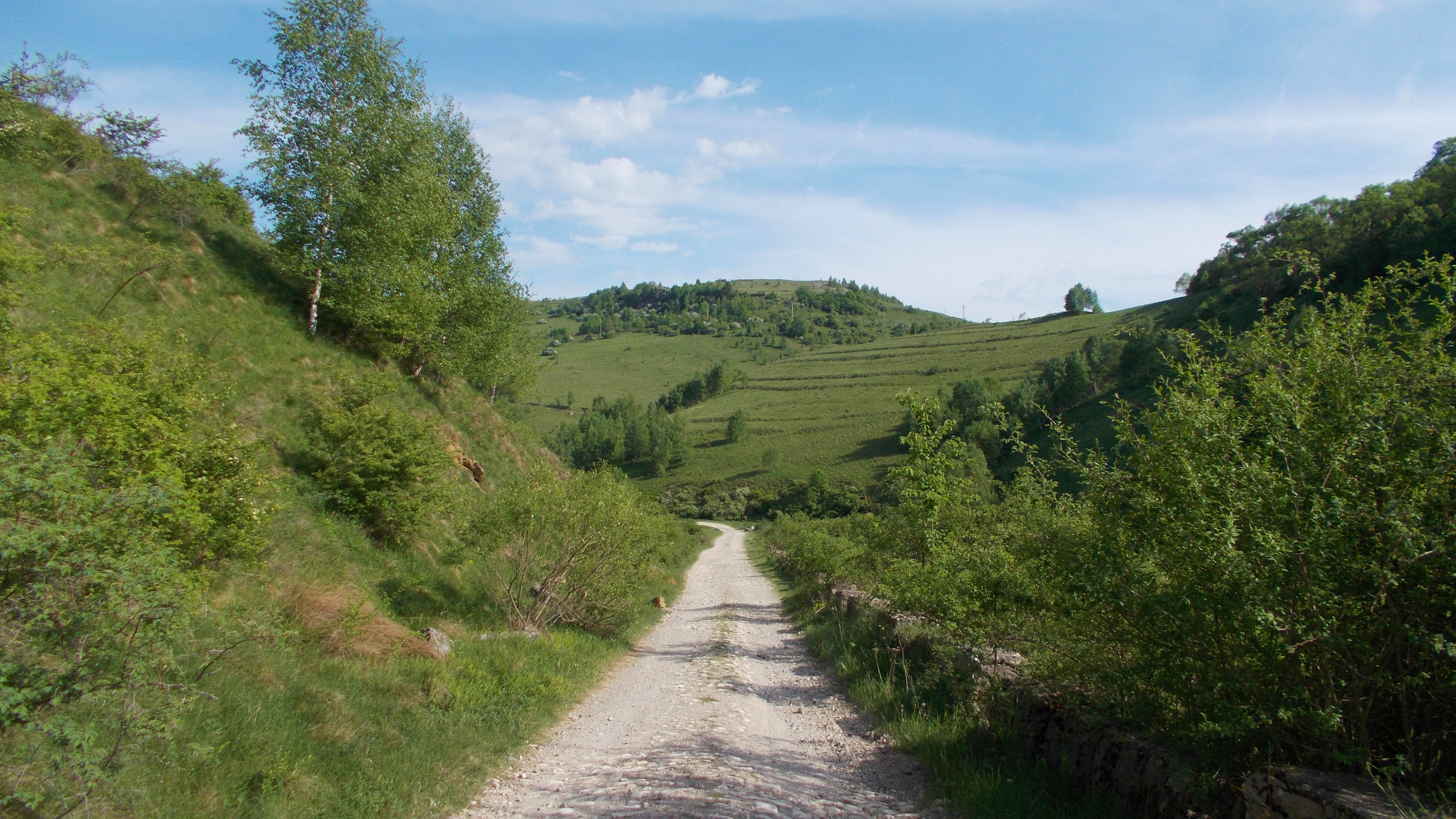 Ținutul Pădurenilor - sit (Natura 2000) de importanță comunitară. Drumul de marmură din satul Alunu, Hunedoara.